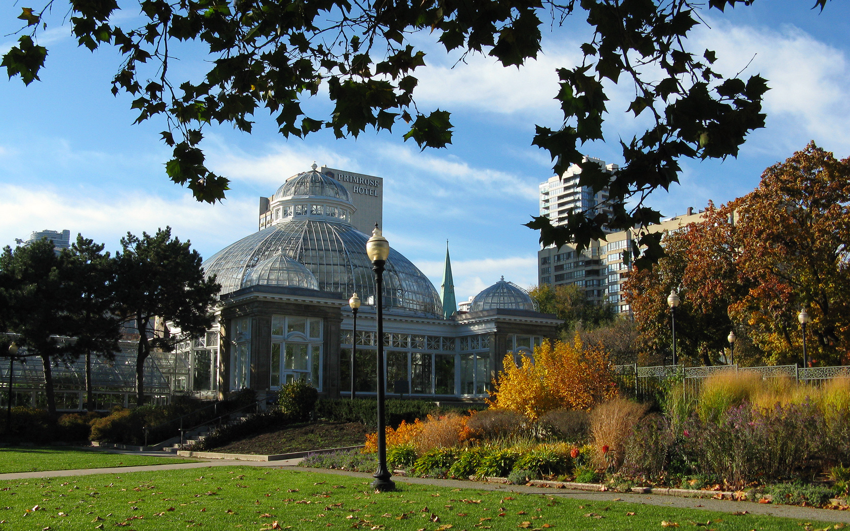 Allan Gardens' Palm House - Toronto, Canada.